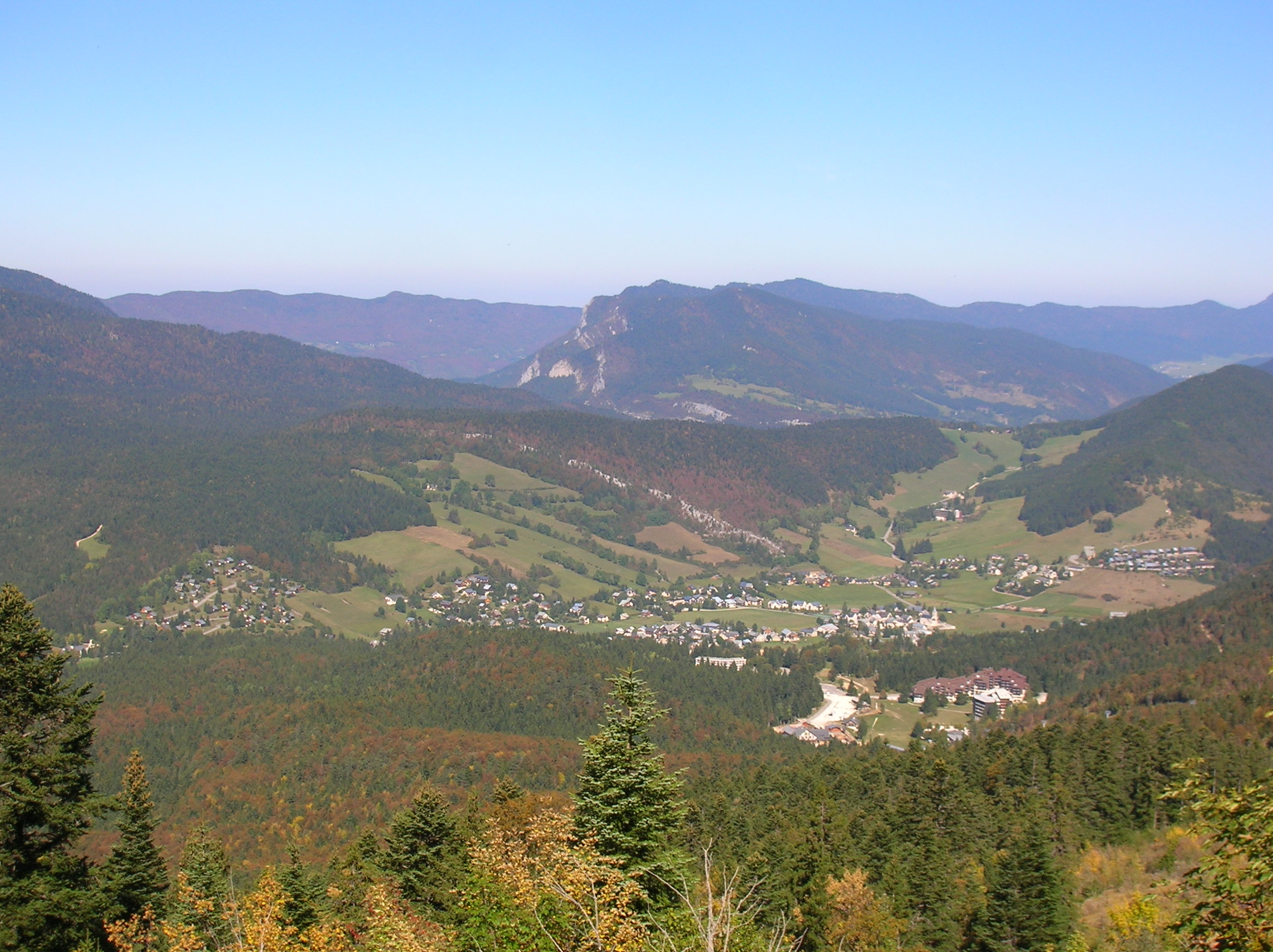 depuis le chemin de Clos de la Balme à Combeauvieux. Corrençon-en-Vercors, Isère, AuRa, France.